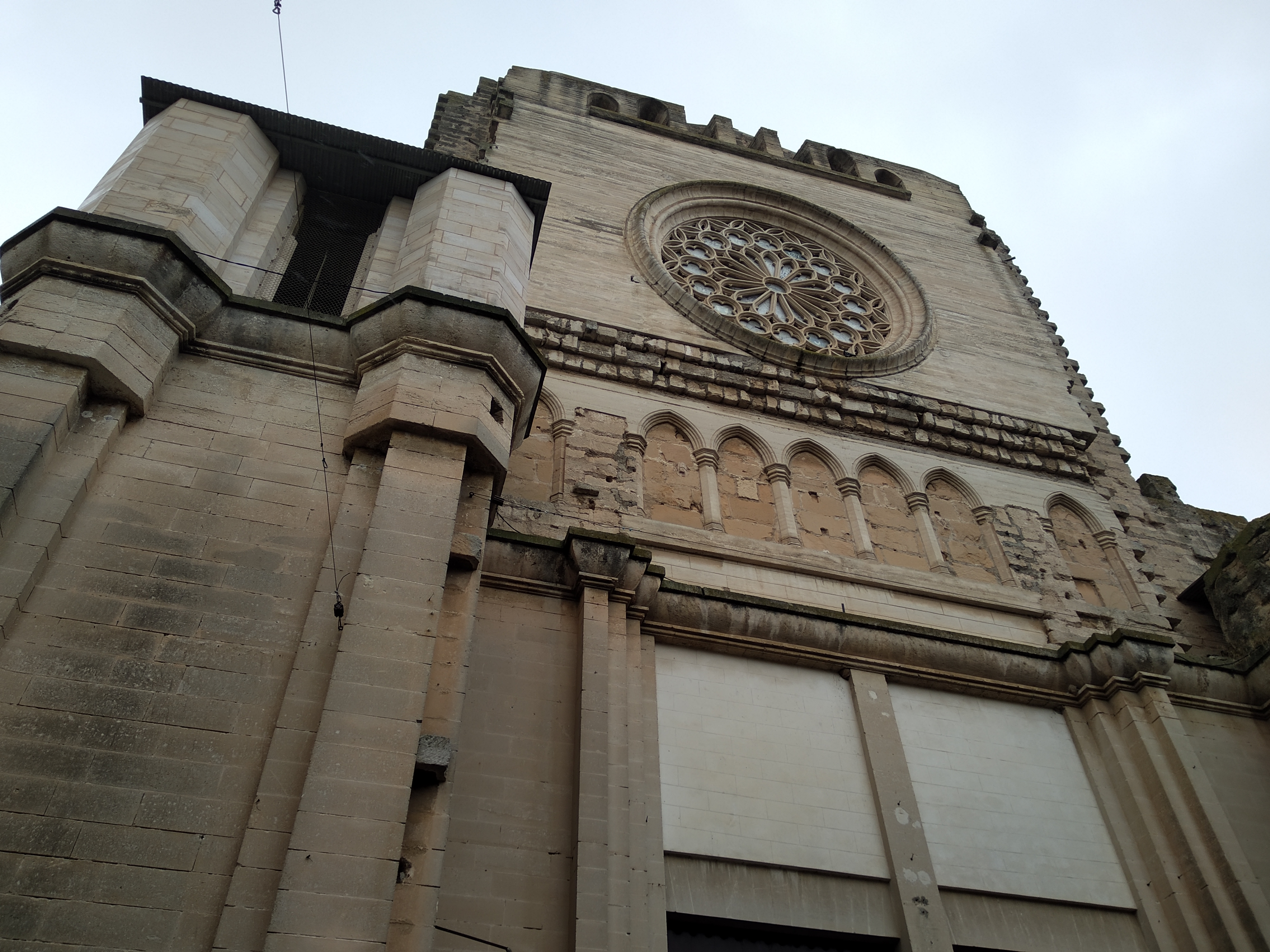 Façana inacabada de l'església Nostra Senyora dels Dolors (Manacor)